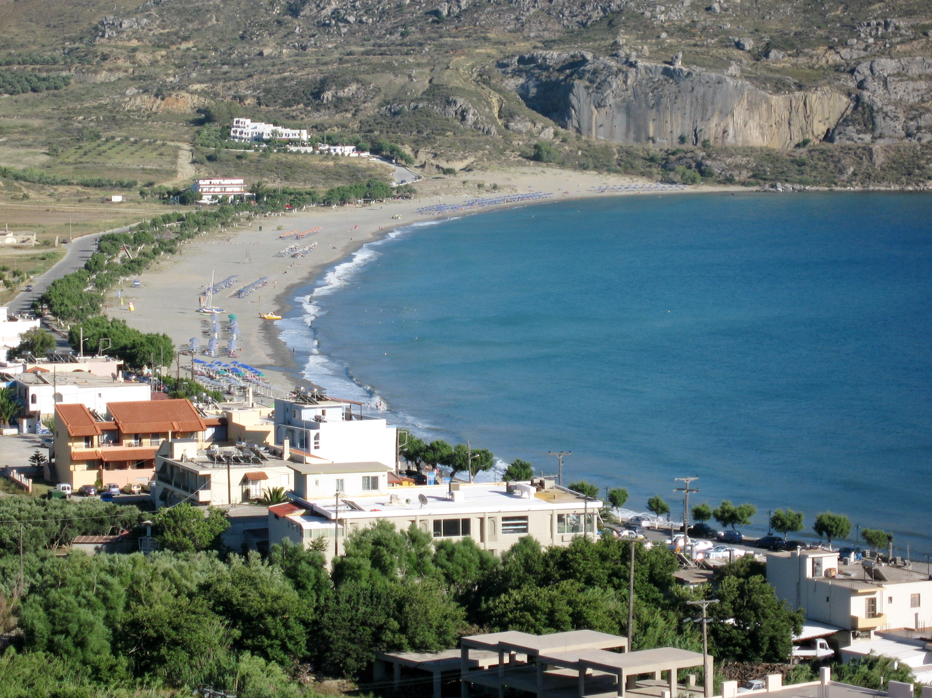 Strand von Plakias, Gemeinde Agios Vasilios, Regionalbezirk Rethymno, Kreta, Griechenland